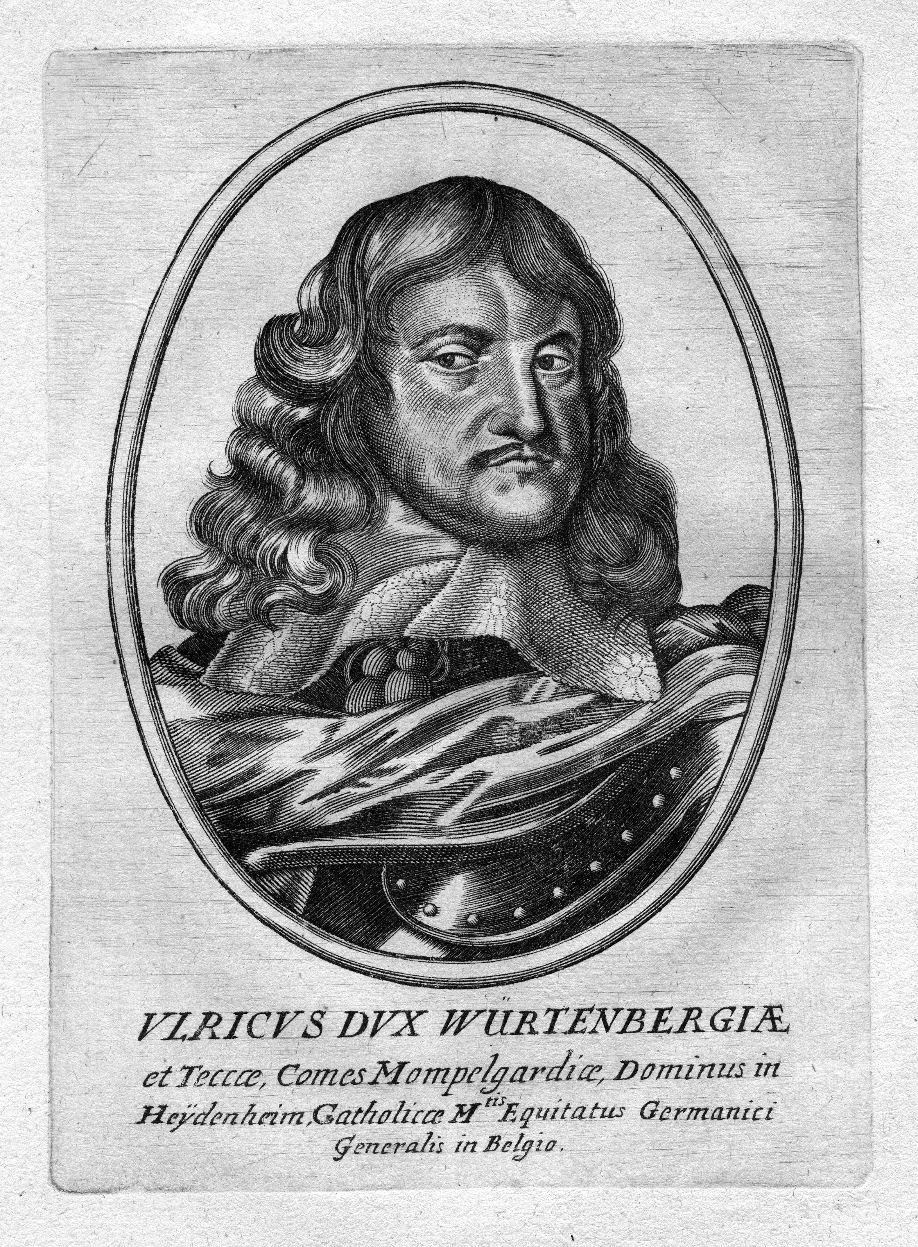 portrait gravé